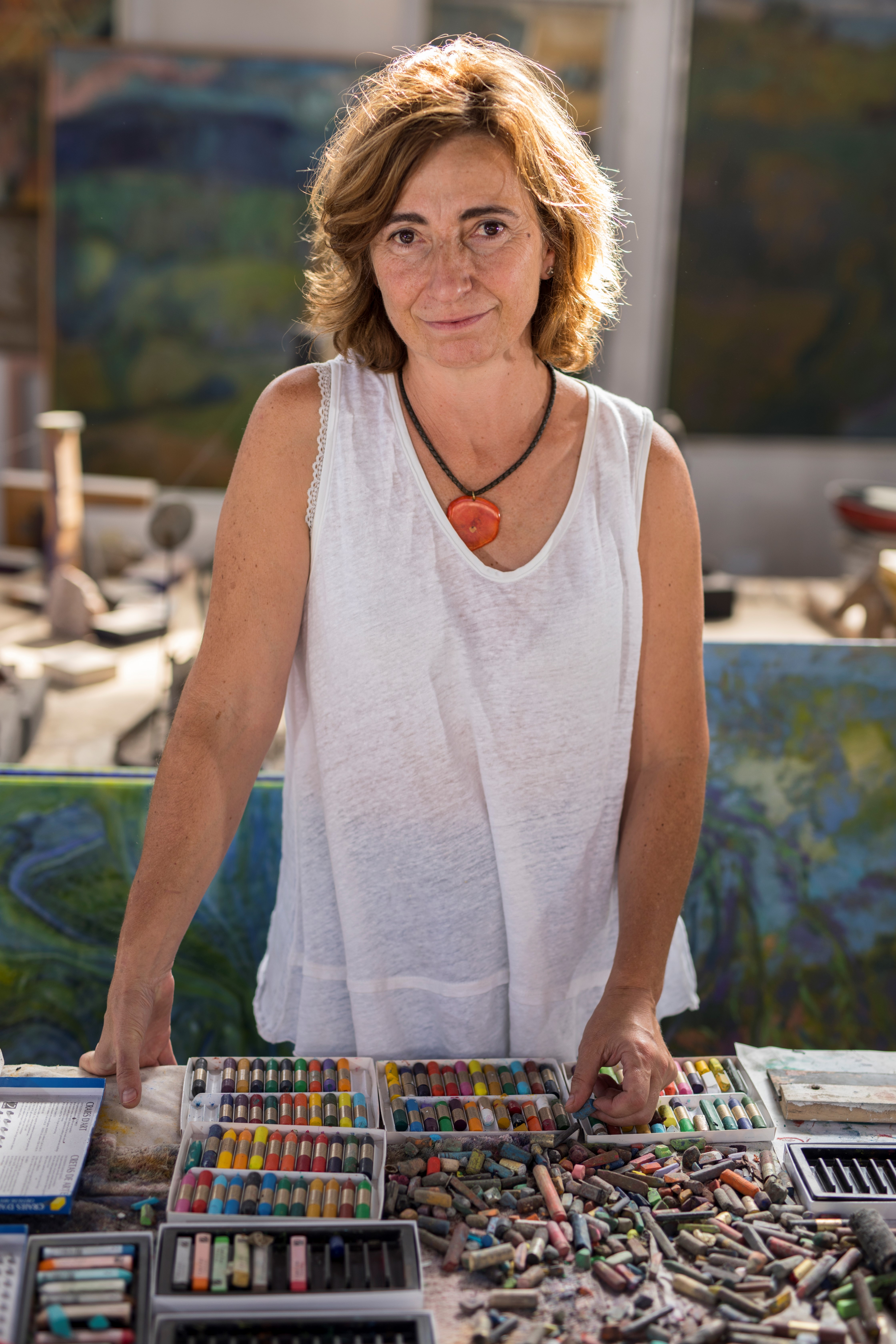 Retrato de la pintora María José Castaño en su estudio de Los Llanillos realizado por Asís G. Ayerbe